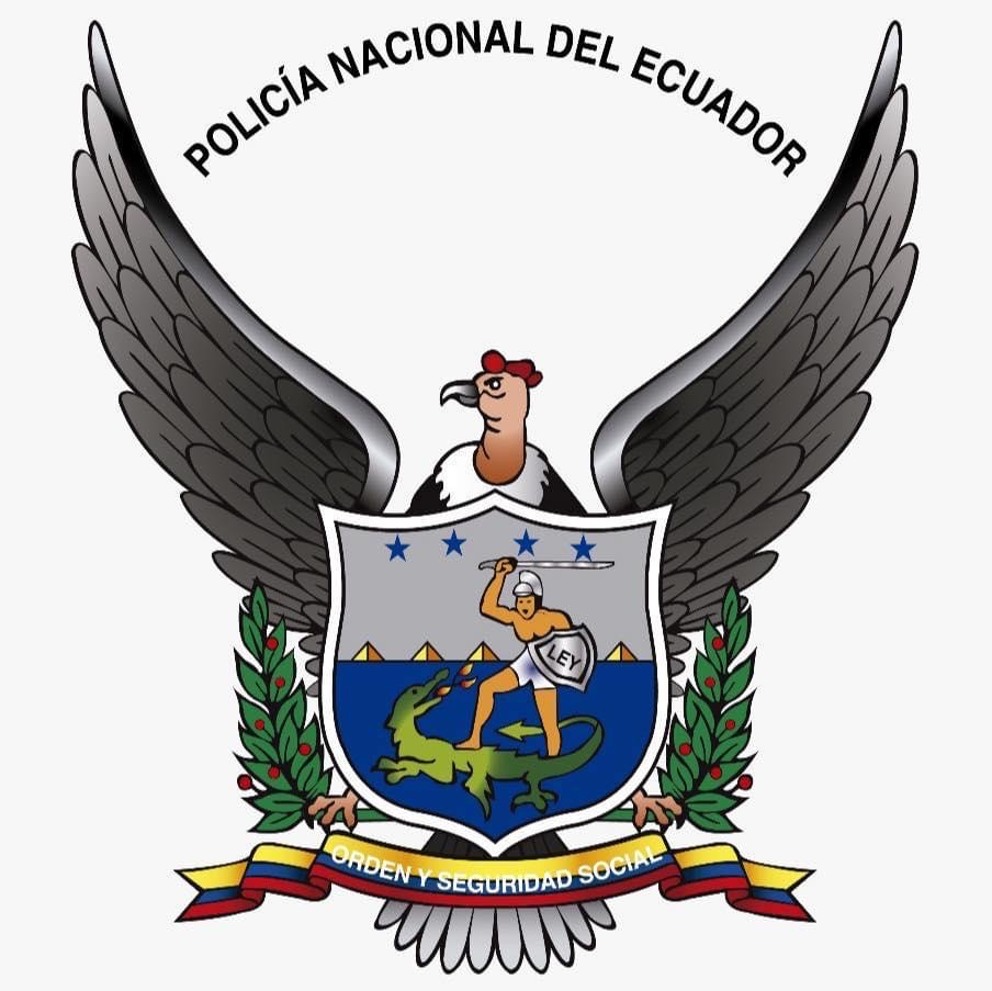 Escudo Policía Nacional del Ecuador